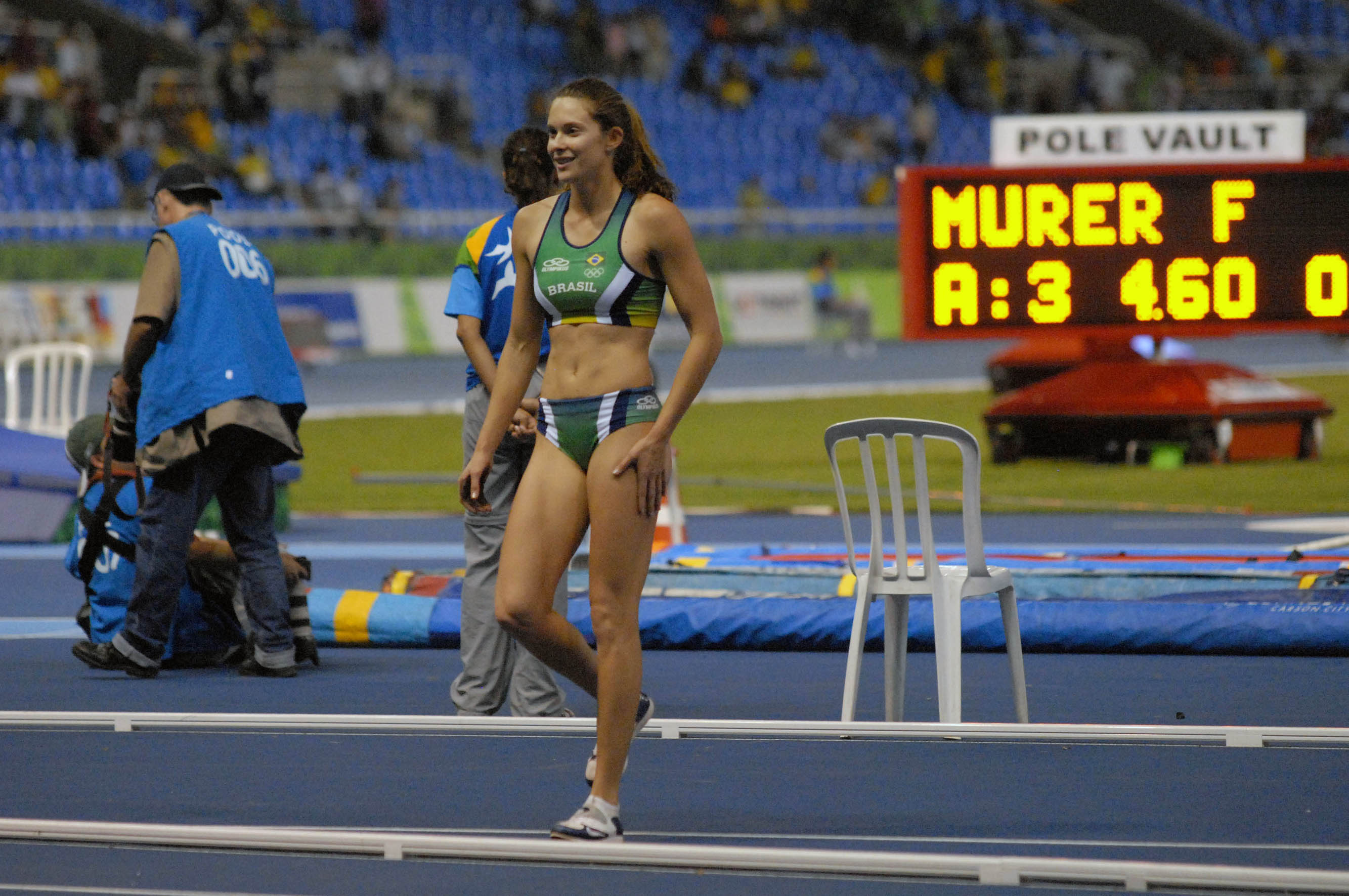 Rio de Janeiro - A paulista Fabiana Murer conquistou a medalha de ouro no salto com vara, ao elevar em 20 centrímetros o antigo recorde pan-americano de 4,40 metros